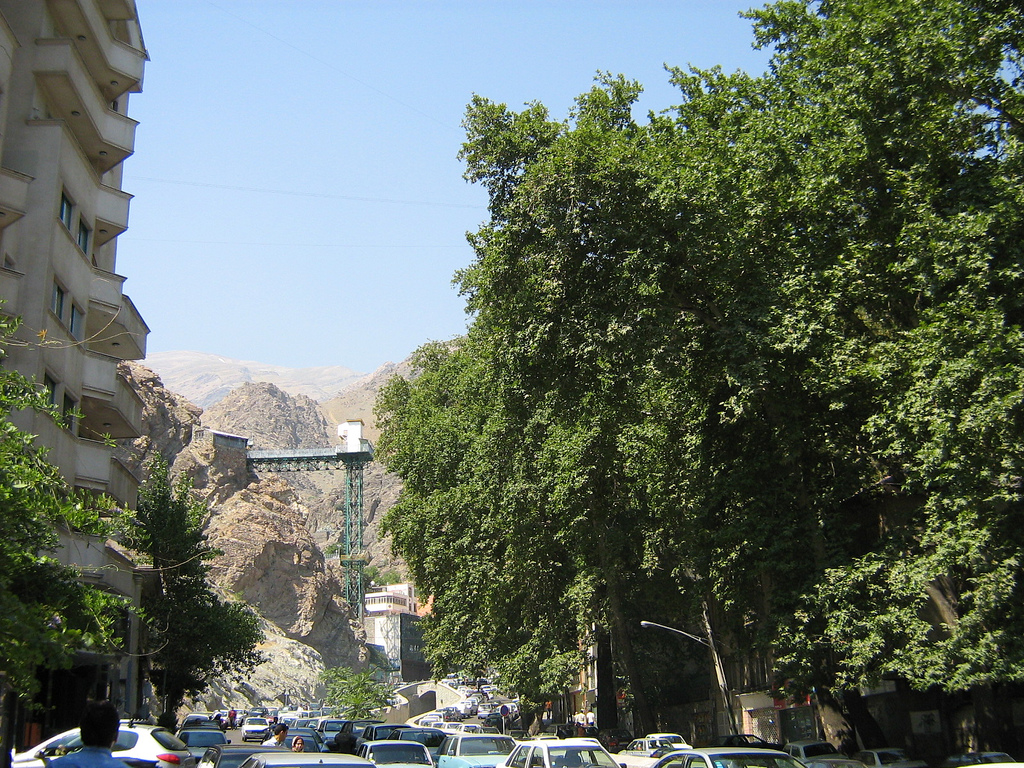 Darband